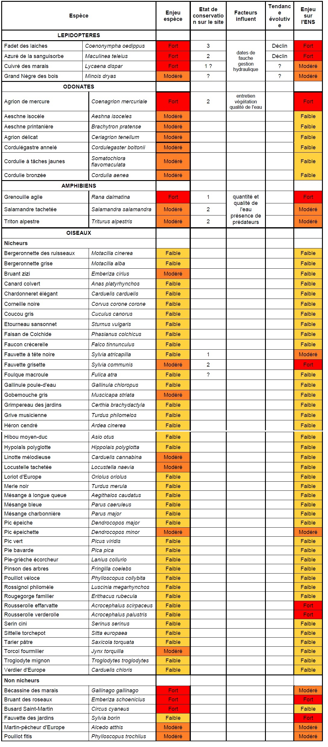 Tableau des enjeux faunistique du marias de Montfort